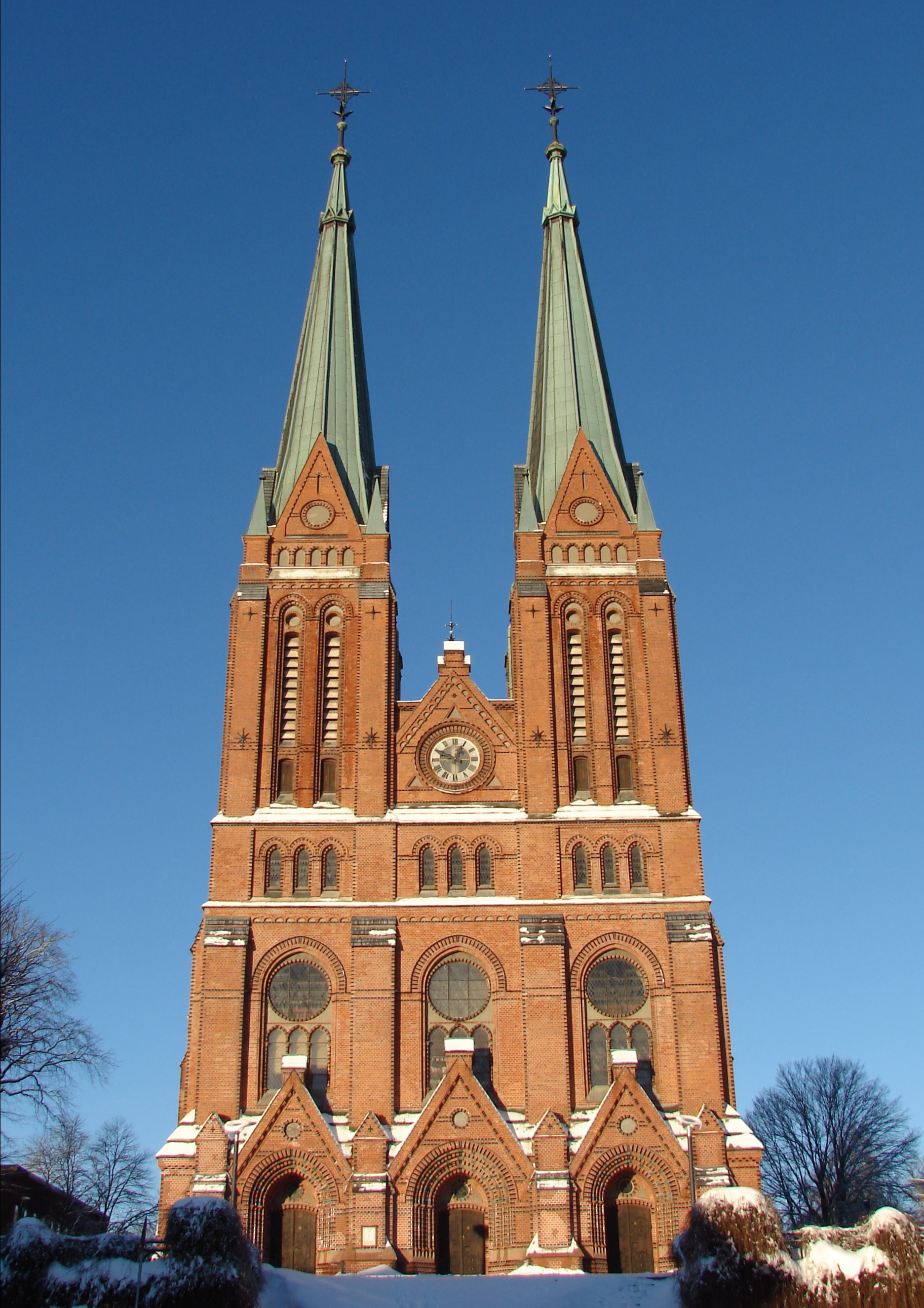 Skien Kirke, Skien i Telemark